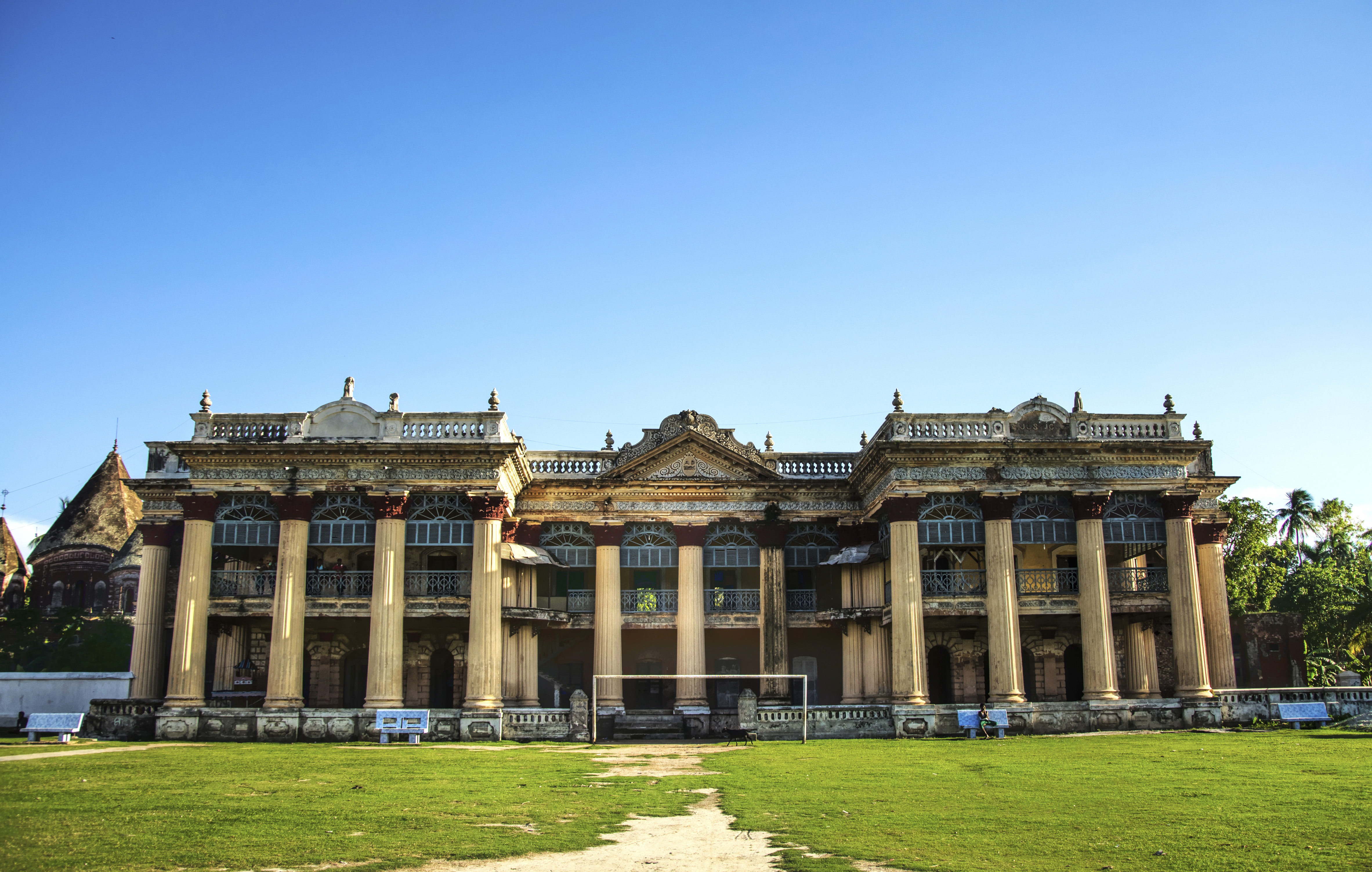 পুঠিয়া রাজবাড়ি ও তৎসংলগ্ন আহ্নিক মন্দির